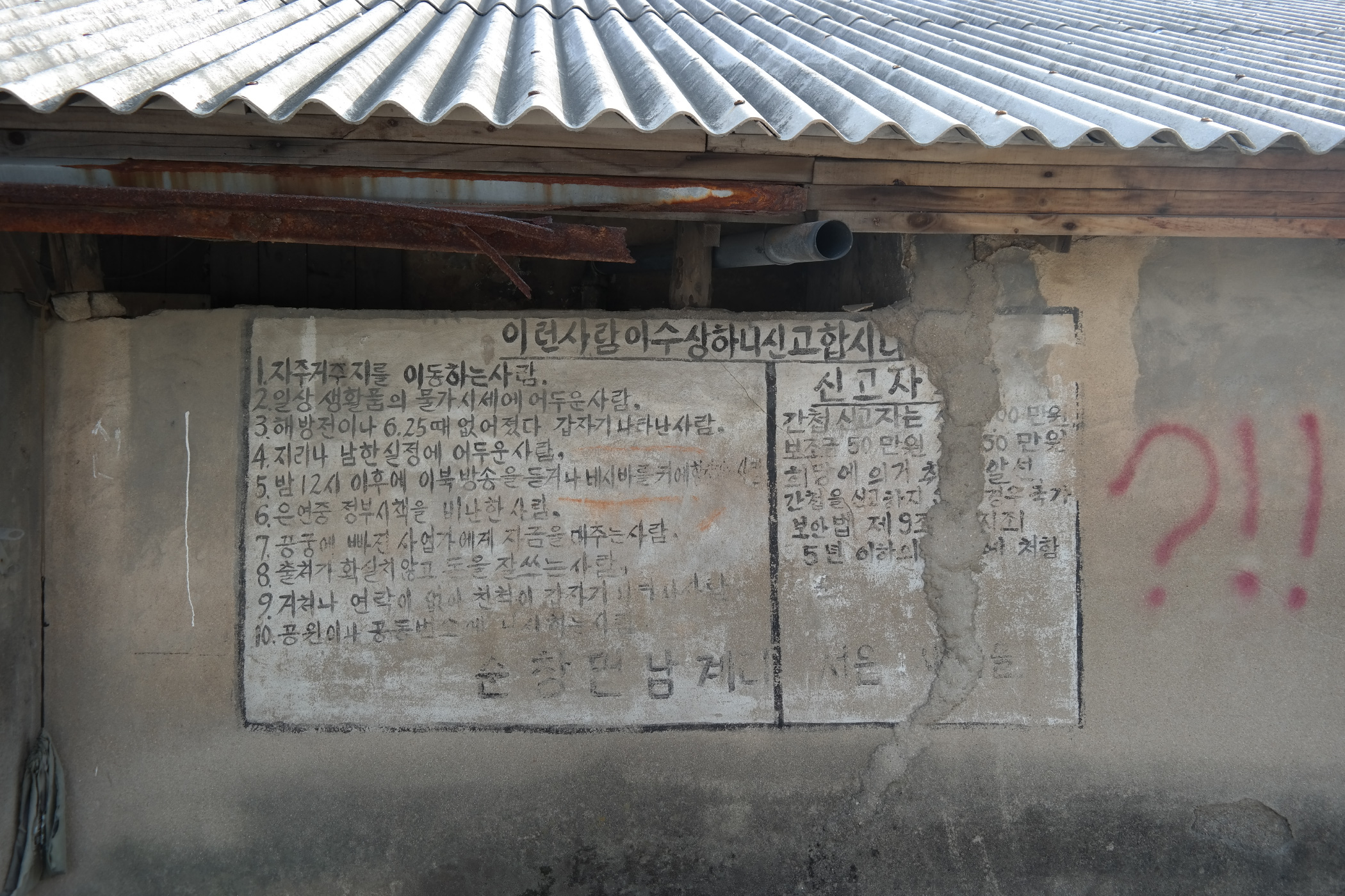 오래된 건물 벽에 있는 거동이상자 신고안내문 (2013년 8월 19일 전북 순창읍에서 촬영)